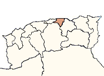 Localisation du département de Tizi-Ouzou, 1962.